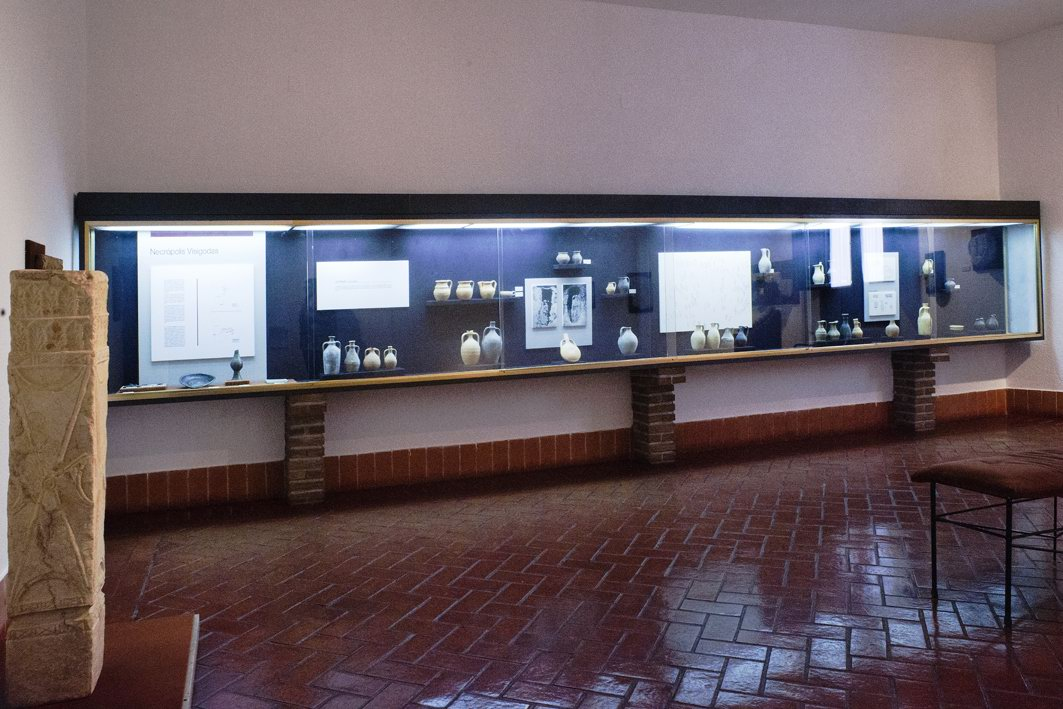 Sala del Museo de Valladolid dedicada a la Arqueología de época visigoda y altomedieval